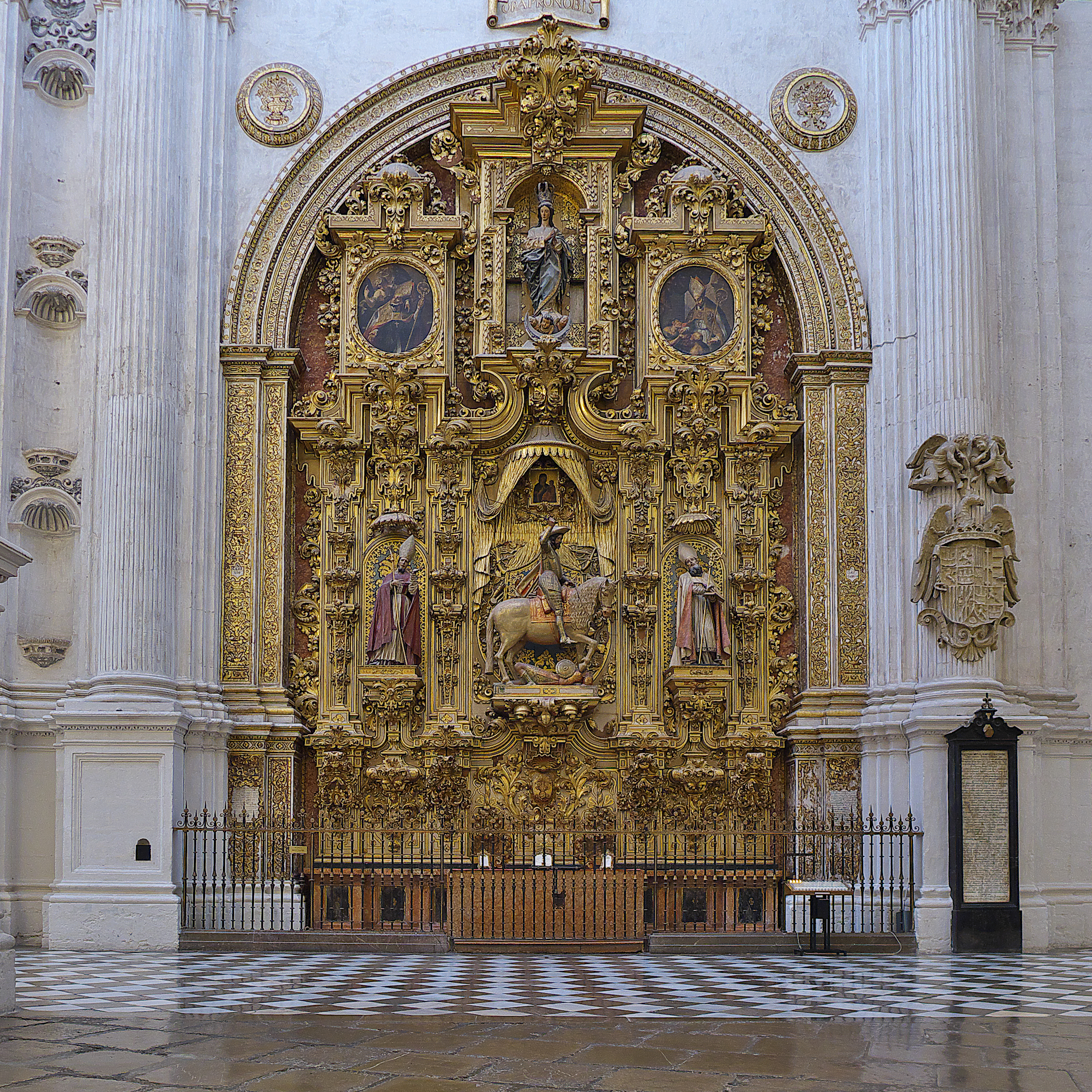 Francisco Hurtado Izquierdo realiza (1707-1708) el retablo dedicado a Santiago el Mayor, que lo consagrará. Ensamblado por Juan de la Torre y dorado por Pedro Romero, con esculturas de Diego de Mora, José de Mora y Alonso de Mena.